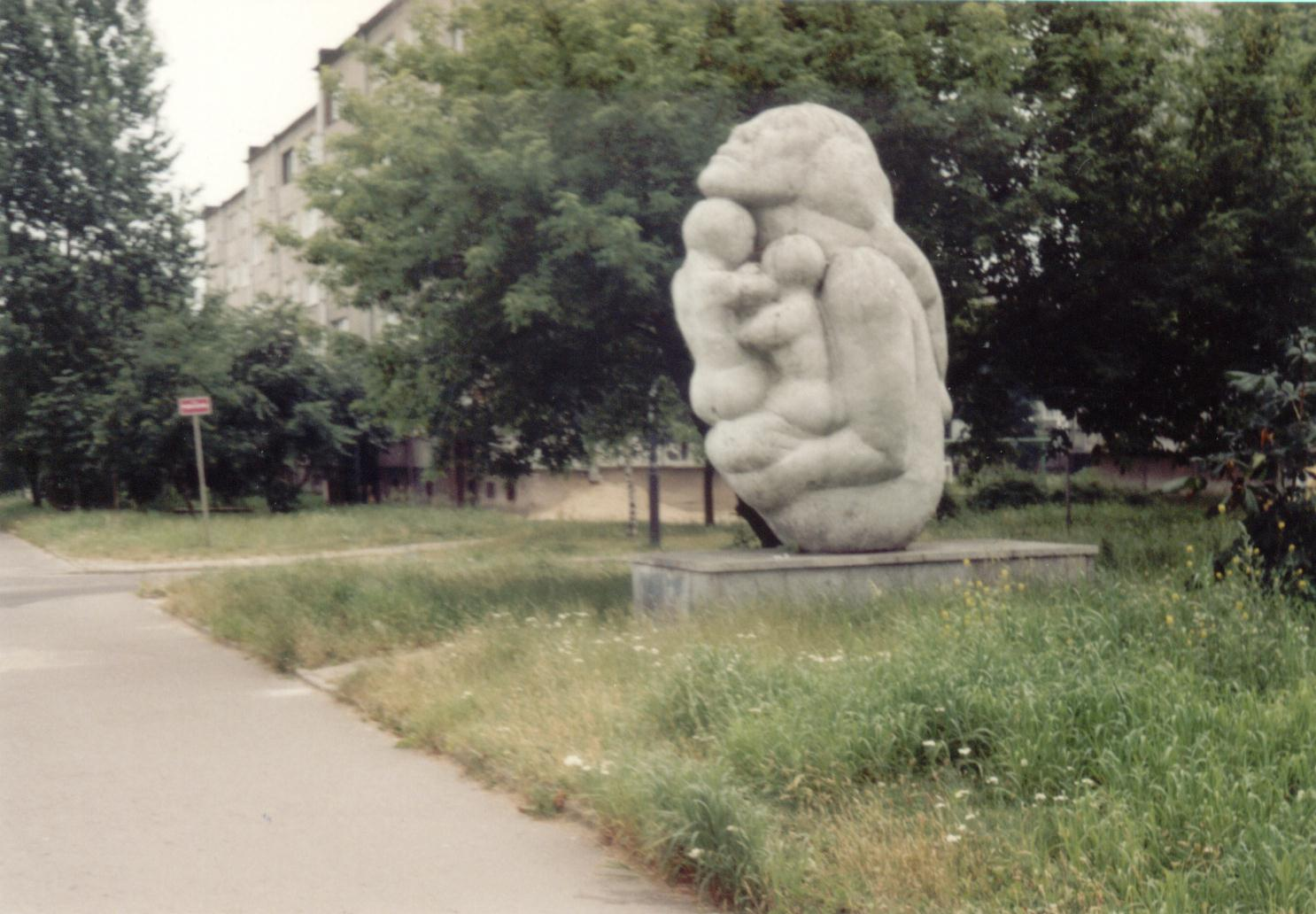 Rzeźba symbolizująca macierzyństwo na osiedlu Retkina w Łodzi